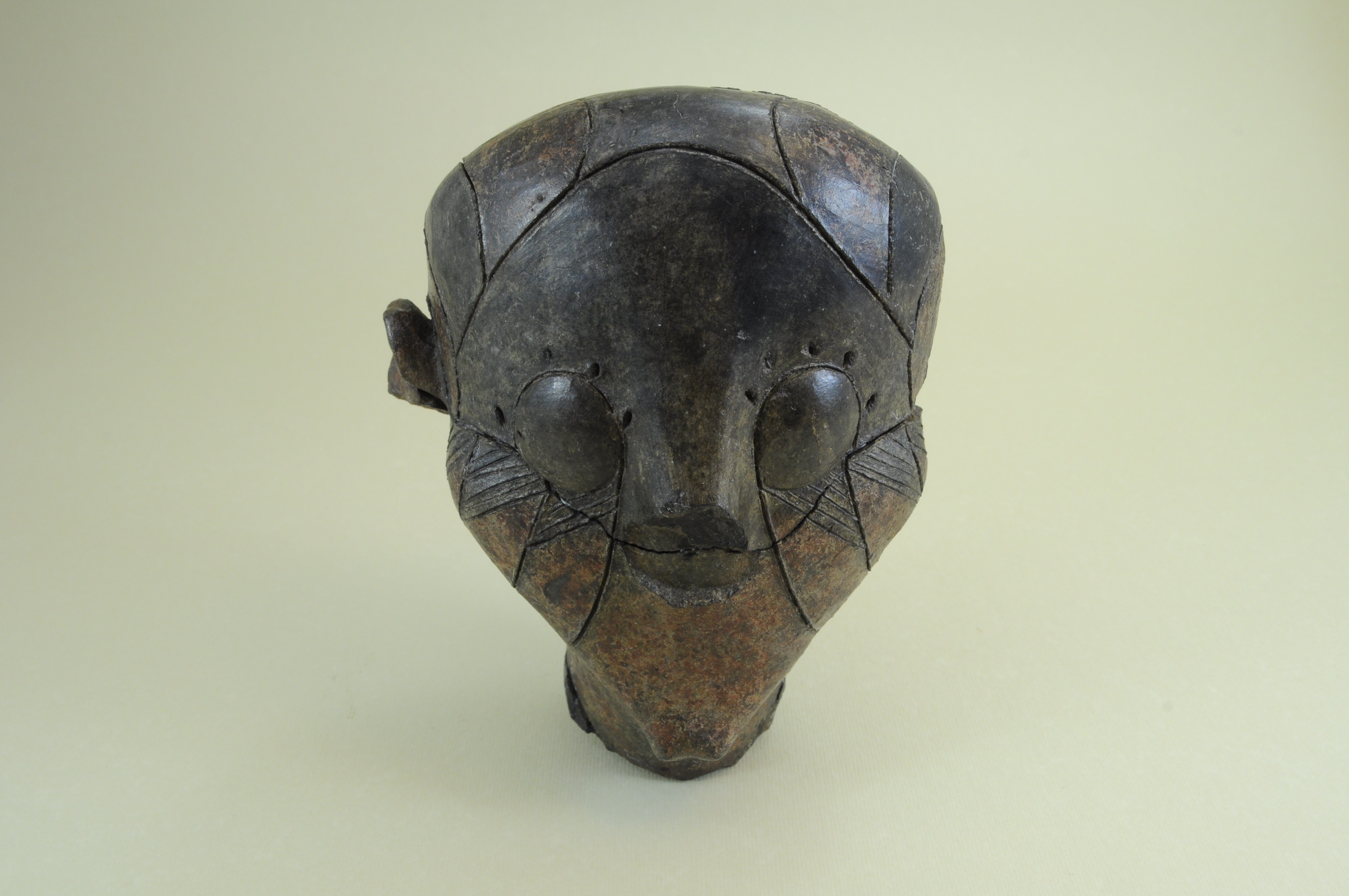 Народни музеј Топлице, археологија, налазиште Плочник, портрет фигурине